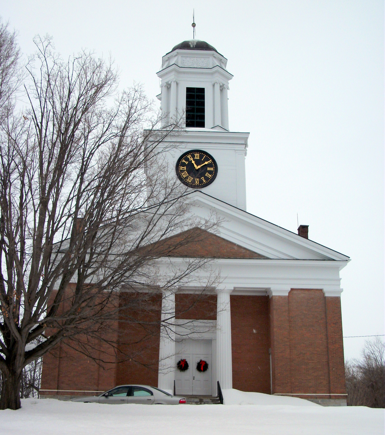 Orwell, Vermont